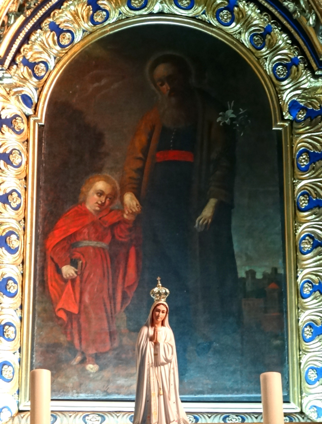 Katedra bydgoska. Obraz św. Józefa z młodocianym Chrystusem (2. poł. w. XVII (pocz. XVIII w.), ze Świętą Rodziną na zasuwie (malowany na desce w pocz. XVII w., pochodzący z dawnej kaplicy św. Anny).